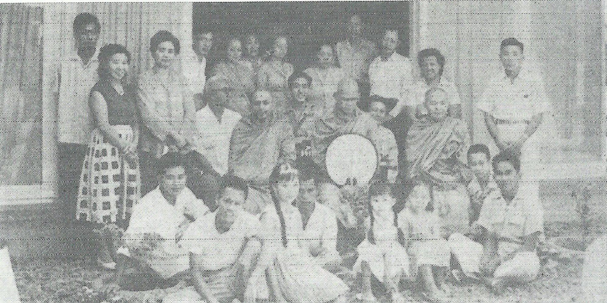 Kunjungan Y.A. Mahasi Sayadaw (Burma) dan Y.A. Piyadassi (Sri Lanka) ke Vihara Vimala Dharma (1959)